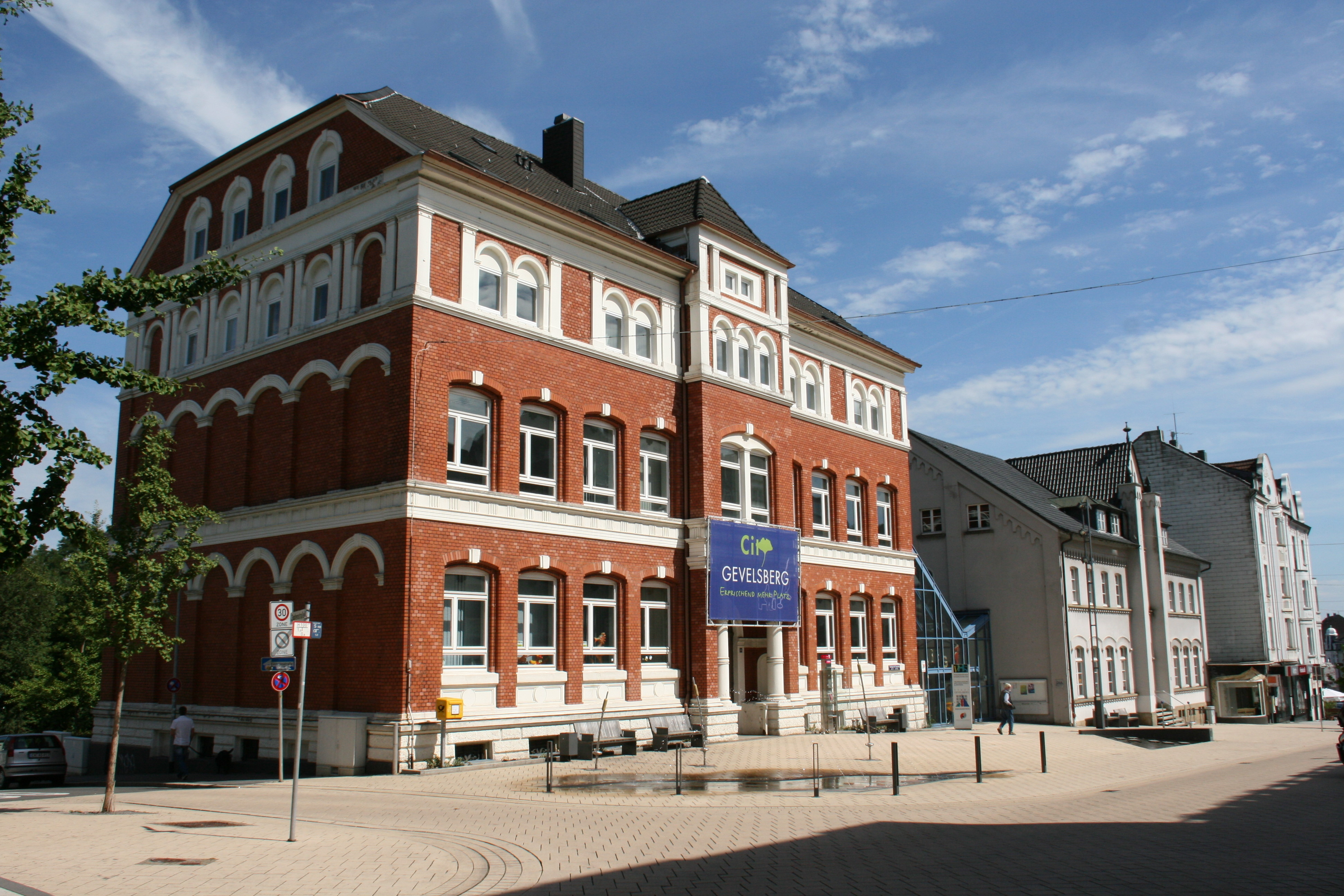 Mittelstraße 86 und 88 in Gevelsberg